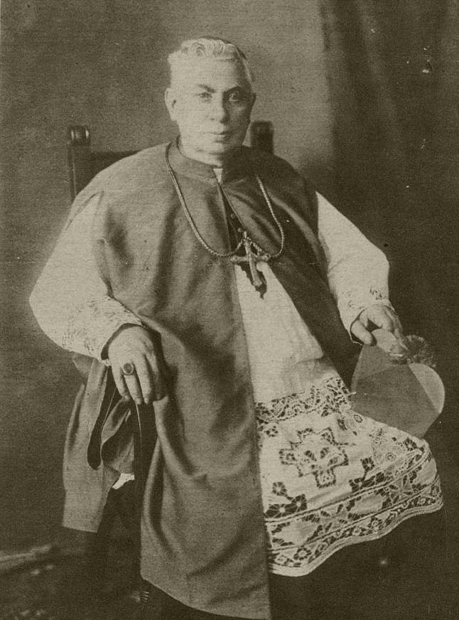 Mgr. J.C. Meeuwissen (1847-1916)